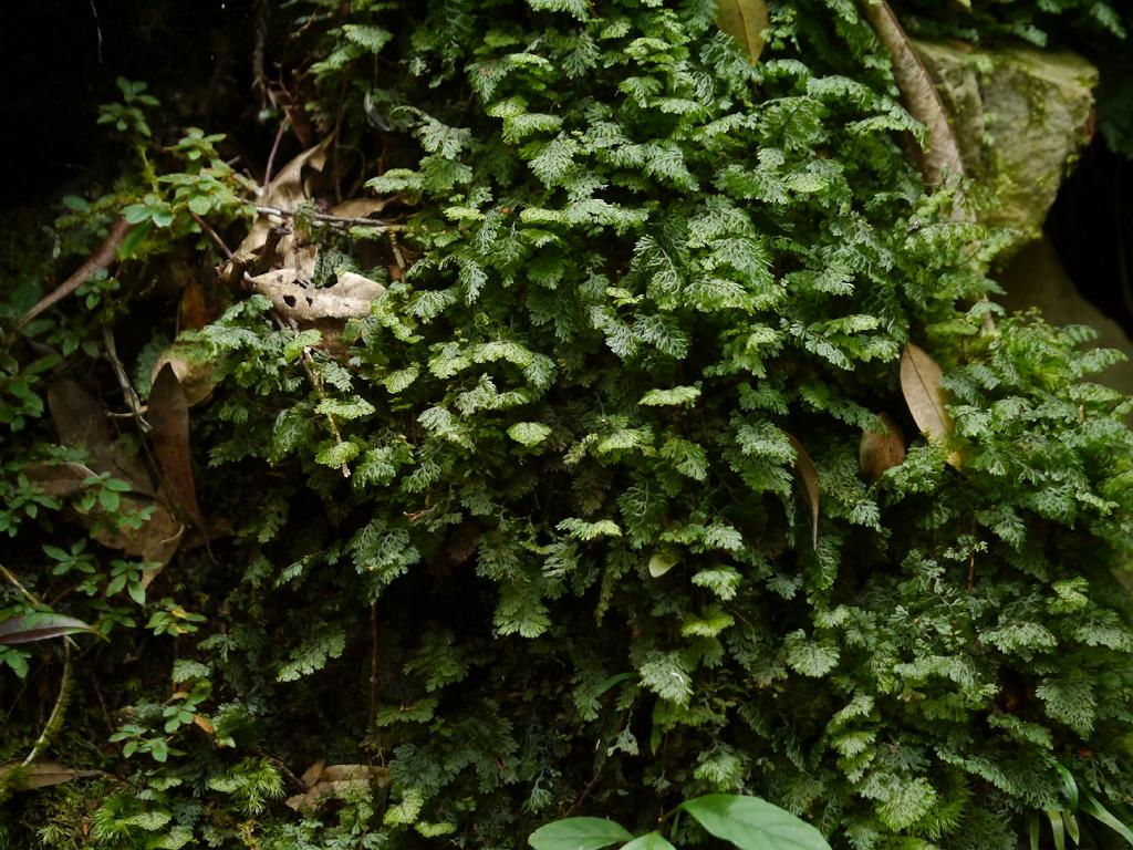 Hymenophyllum barbatum：コウヤコケシノブ 2015/10/12 和歌山県田辺市：Tanabe City. Wakayama Pref. Japan